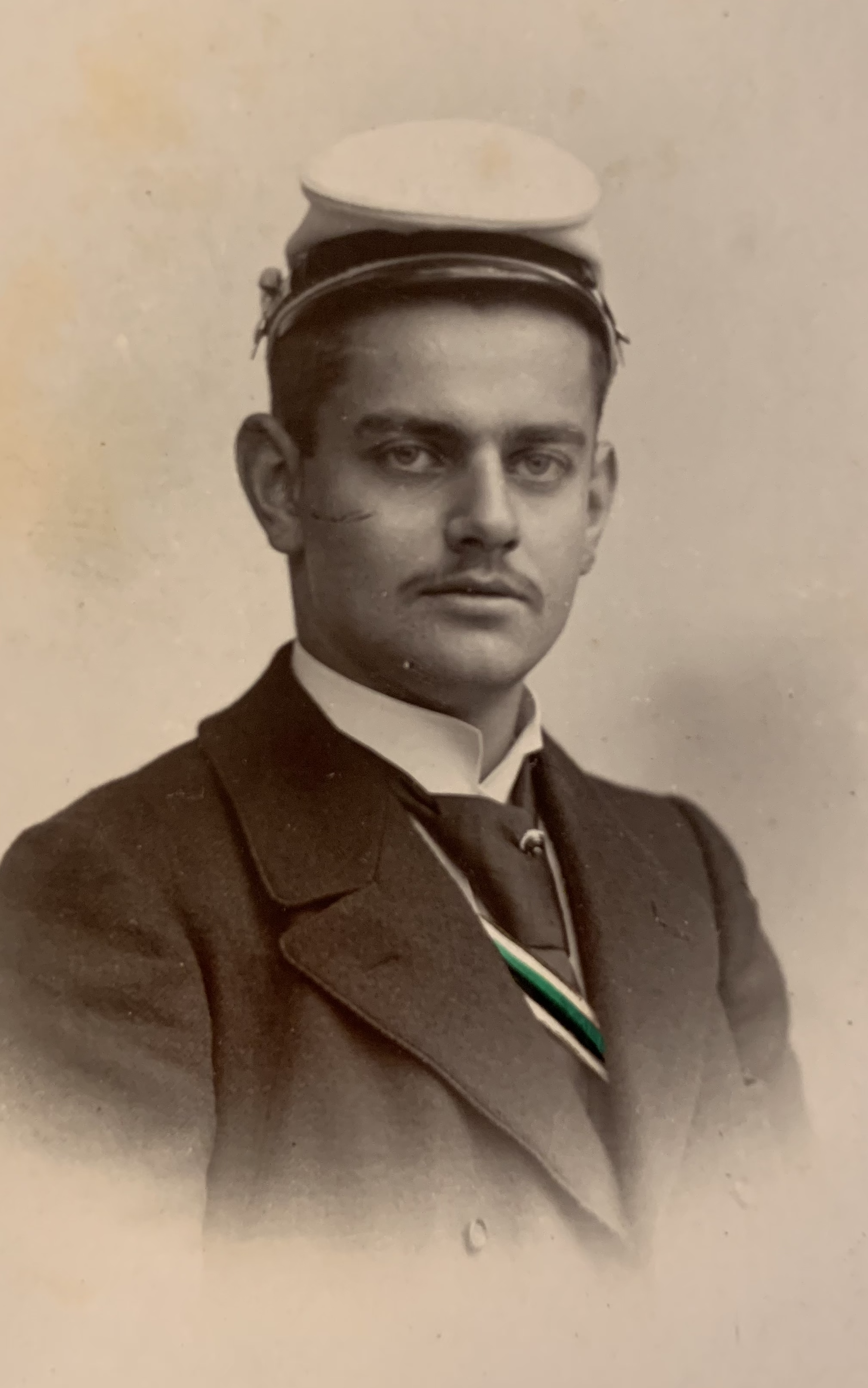 Porträtfotografie von John Menger als Corpsstudent in Heidelberg